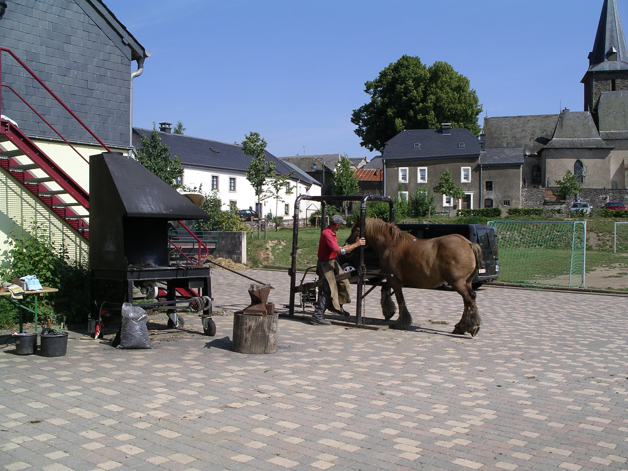 Ardenner Pferd wird beschlagen, Robbesscheier Munshausen